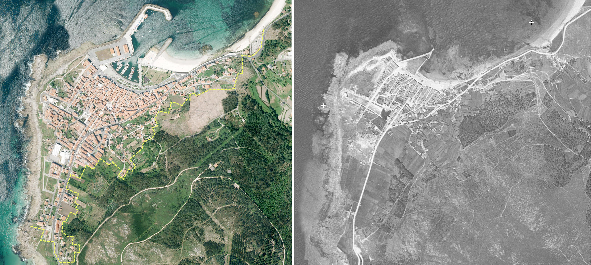 Comparación de Porto do Son. Izquierda: 2017 - Derecha 1955